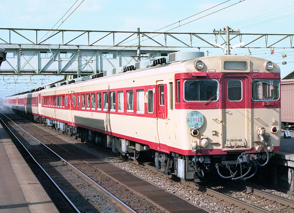 国鉄キハ28 2049 ロマンスカー先頭の急行「能登路」。